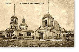 Троицкий и Благовещенский соборы в Порхове. Утрачены в 1960-х гг. Дореволюционная фотография